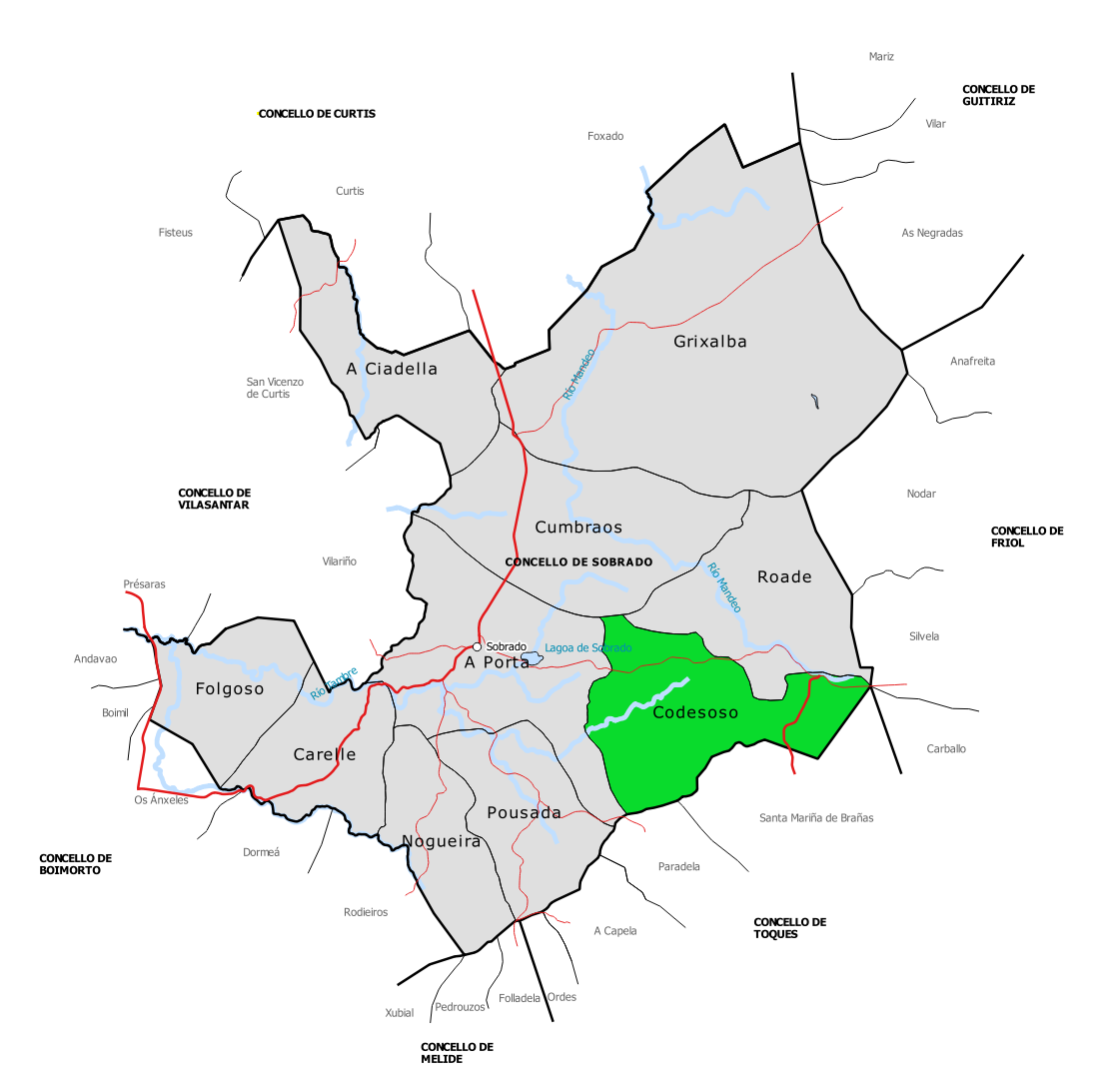 Mapa da parroquia de Codesoso no concello de Sobrado (Galiza).